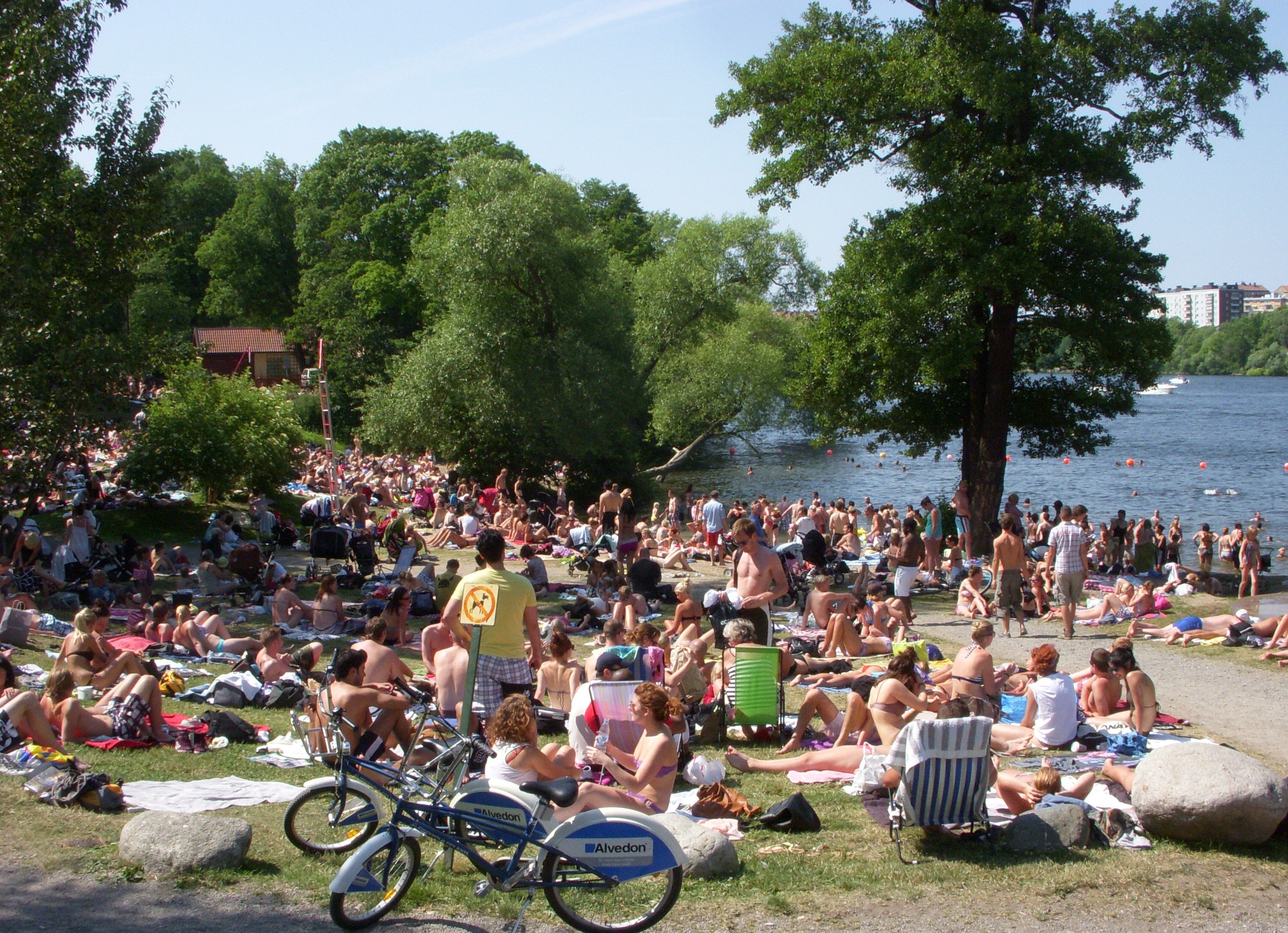 Långholmsbadet